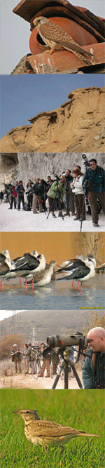 Imagen realizada a base de un collegue de imágenes, todas y cada una de ellas tomadas por mi.